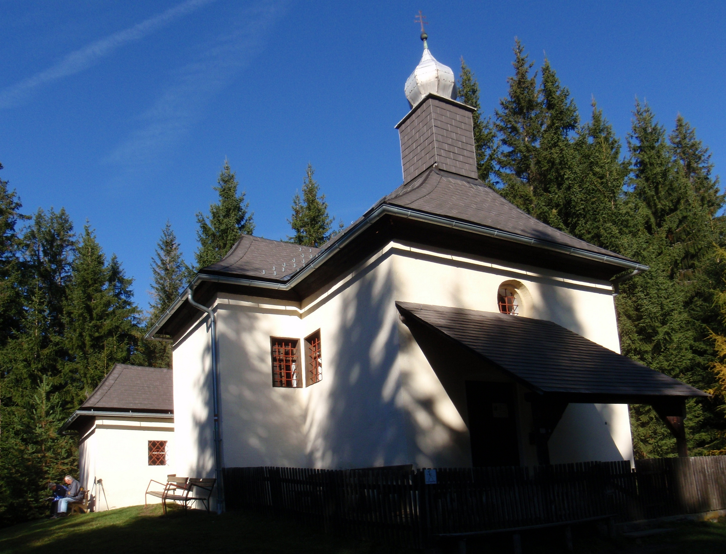 Kalvarienbergkirche am Tremmelberg; eigene Aufnahme des Autors